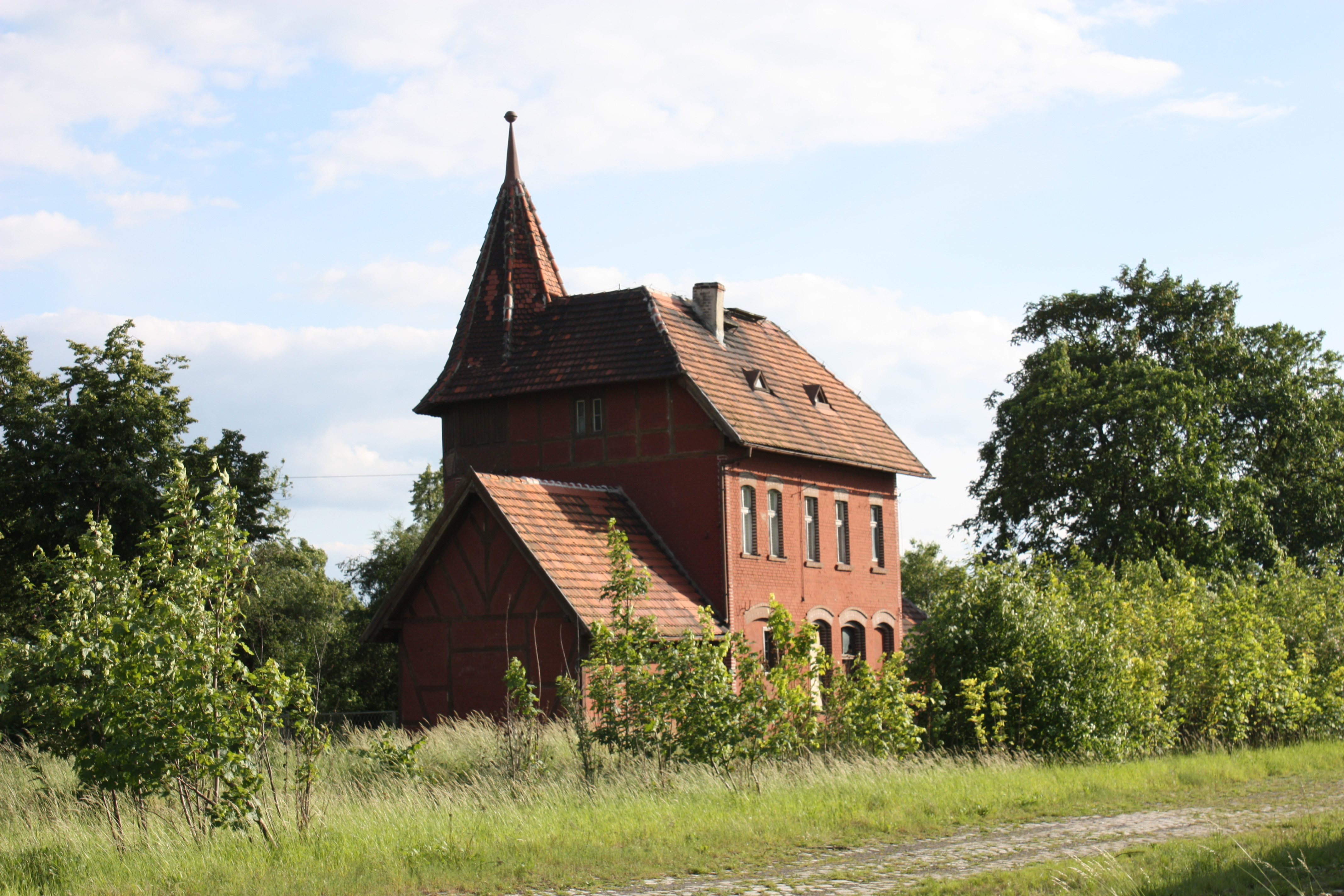 Przystanek kolejowy w Mierczycach